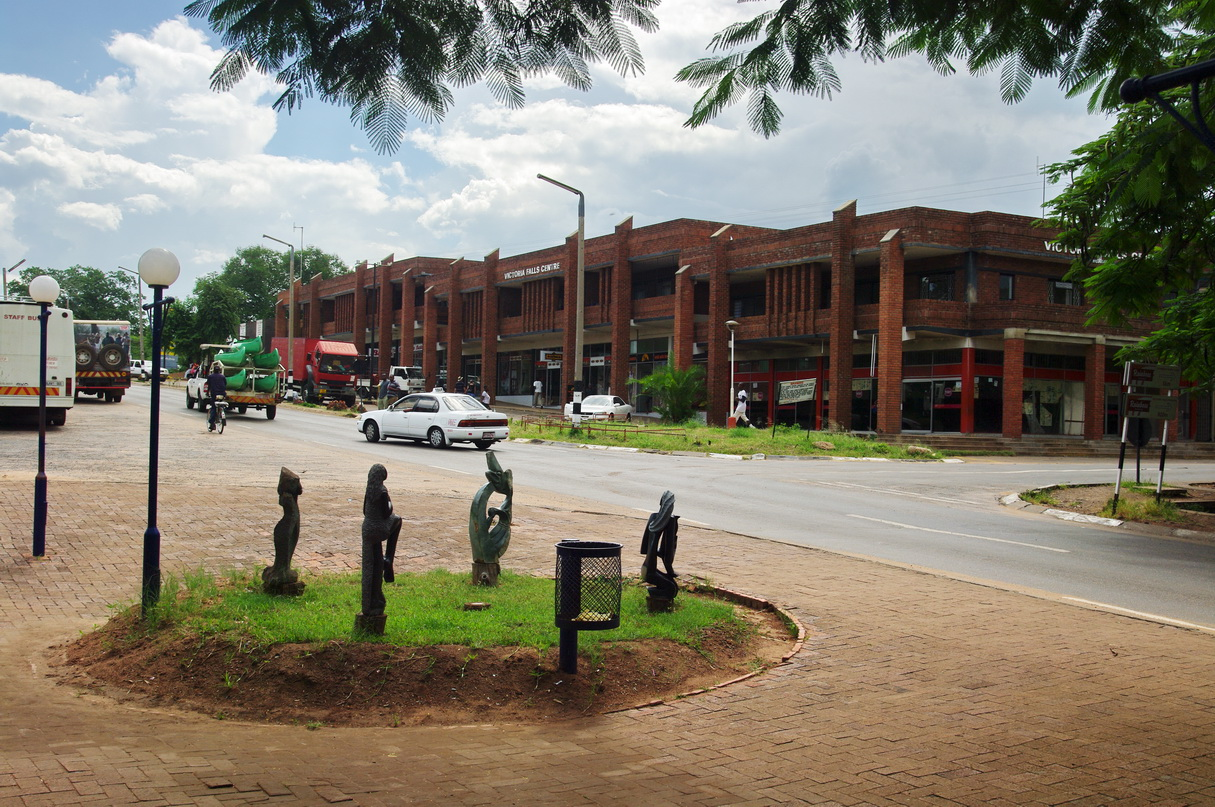 Straße in Victoria Falls